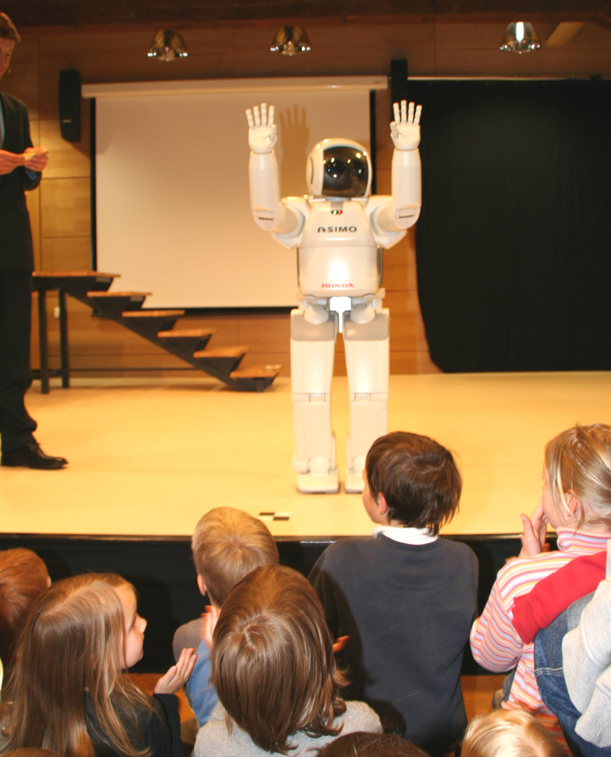 ASIMO 103.